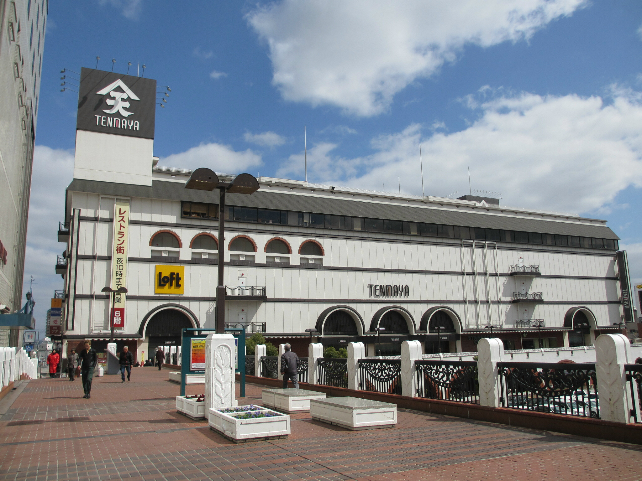 Tenmaya Kurashiki